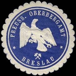 Sealing stamp Title: Preussisches Oberbergamt - Breslau Description: blau, weiß, geprägt Place: Breslau size: 4 cm